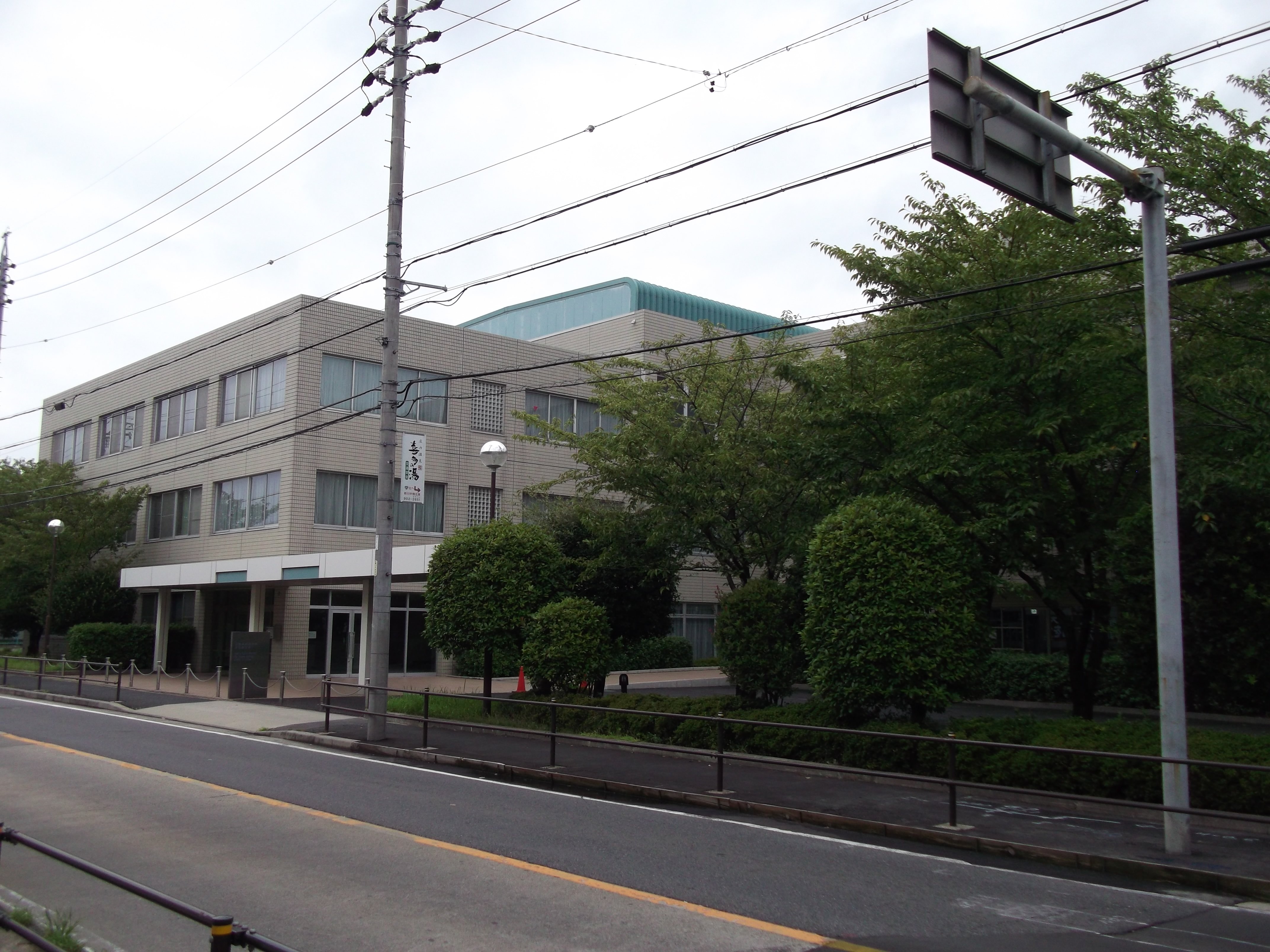 名古屋市北区浪打町の法務総合研究所名古屋支所を南側公道東側より撮影